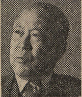 제2대 주미 대사를 지낸 양유찬